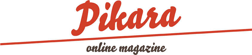 Logotipo de la revista Pikara